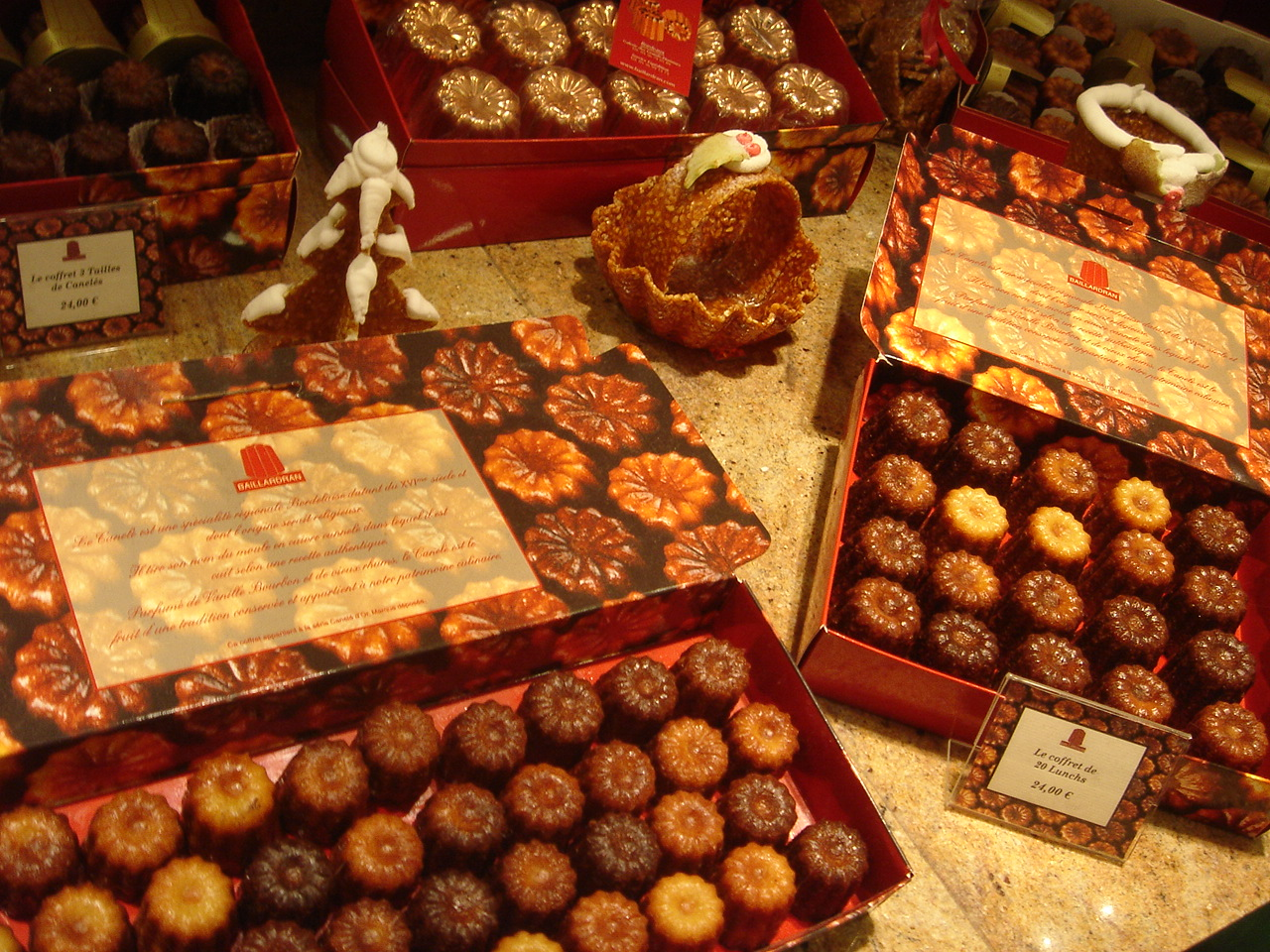 Canelés, eine Gebäckspezialität aus Bordeaux, präsentiert in einer Auslage. Selbst fotografiert von Benutzer:Bordeaux im Dezember 2006. --Bordeaux 00:12, 21. Jan. 2007 (CET)